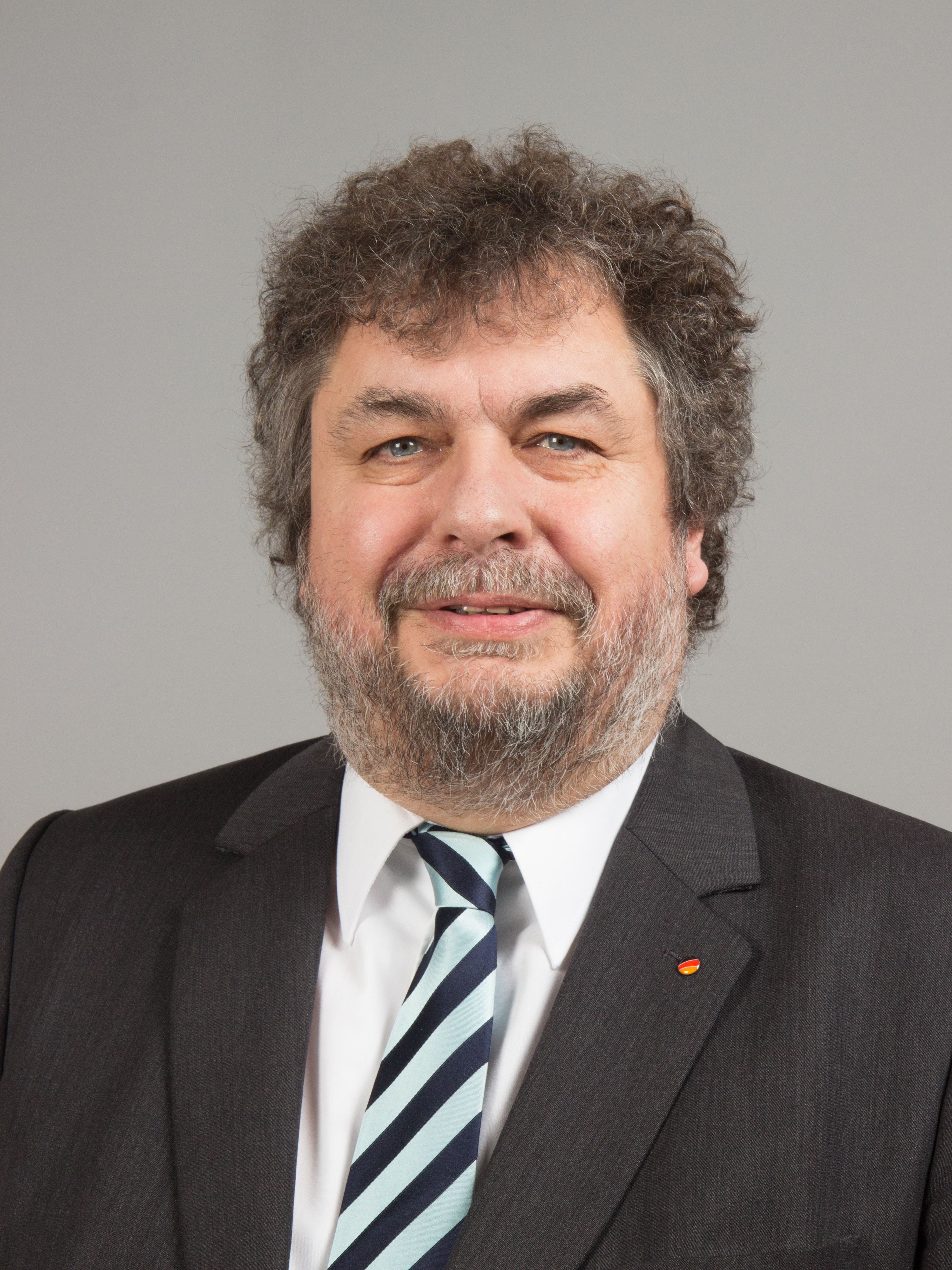 Wolfgang Reichel, Abgeordneter des Landtags von Rheinland-Pfalz